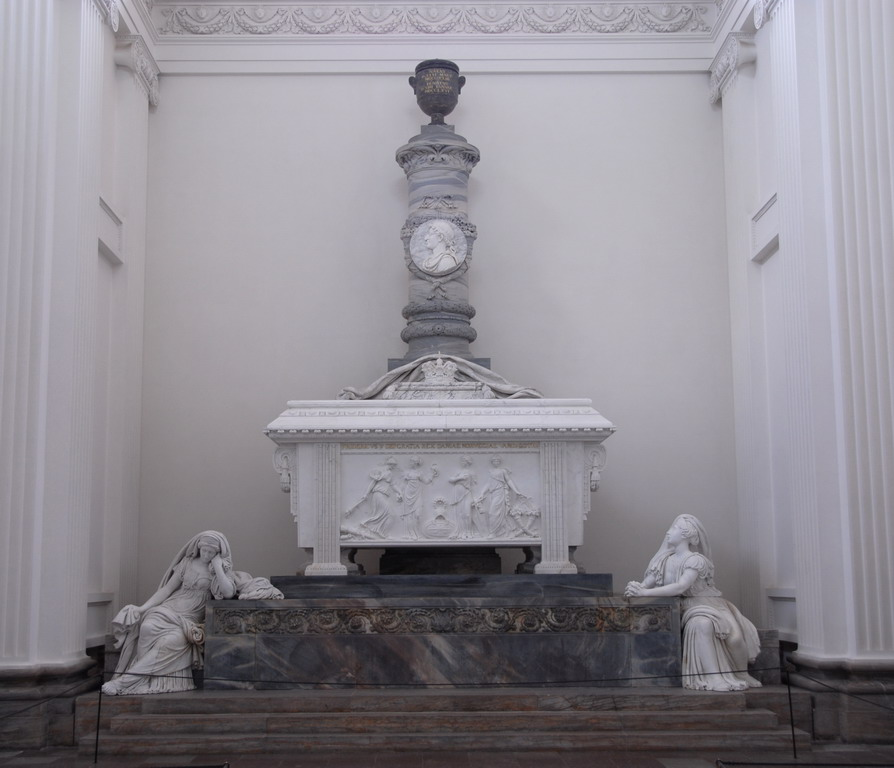 The Chapel of Frederik V (architects Hansen and Harsdorff). Aangebouwd tussen 1774 en 1825. Frederik V (1723-1766) was king of Denmark and Norway from 1746 till his death in 1766. The mourning women symbolize Denmark and Norway (made by Danish artist Johannes Wiedewelt). Frederik V (1723-1766) was koning van Denemarken en Noorwegen van 1746 tot zijn dood in 1766. De treurende vrouwen symboliseren Denemarken en Noorwegen (gemaakt door de Deense kunstenaar Johannes Wiedewelt).